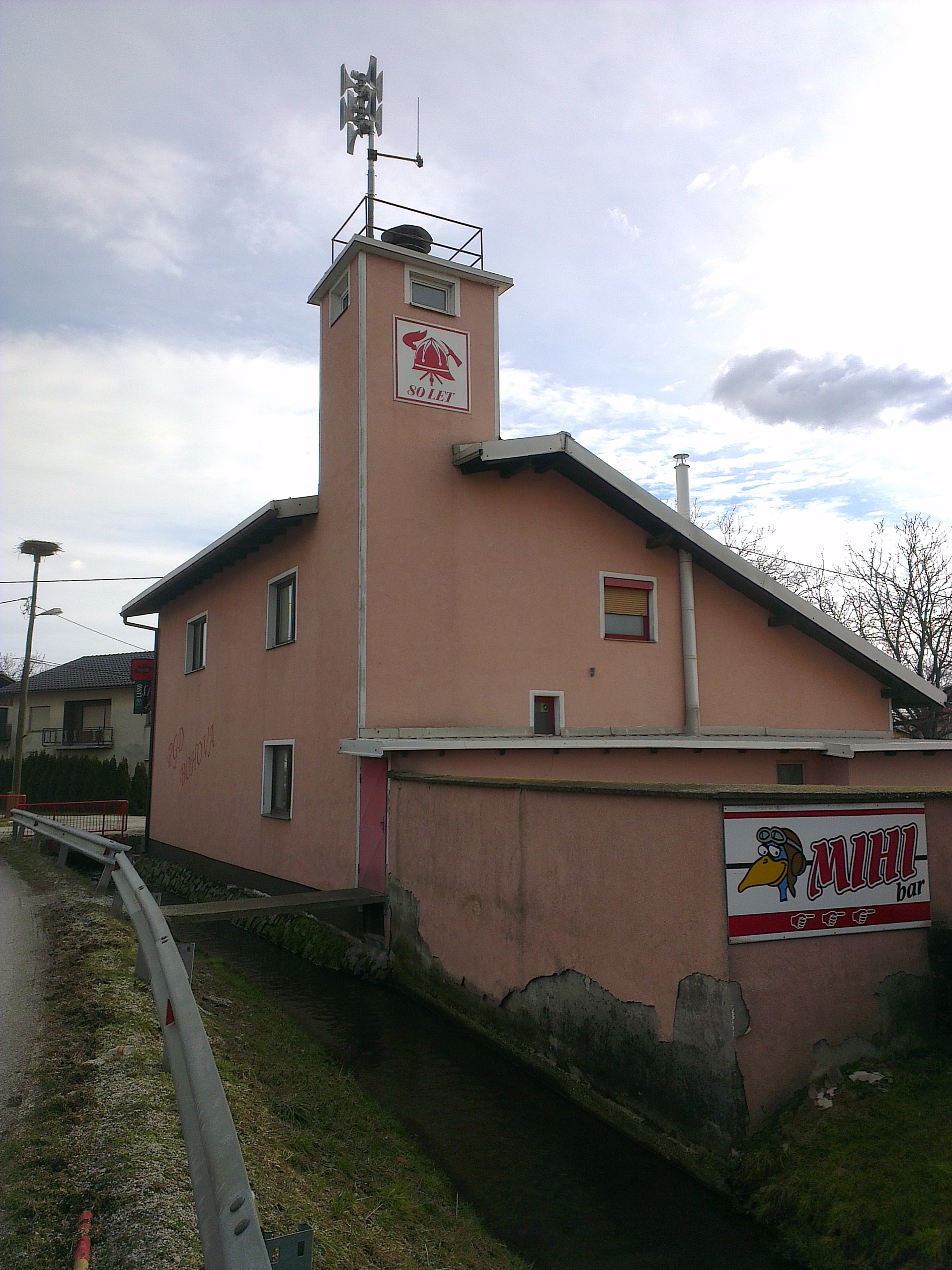 Gasilski dom Bohova